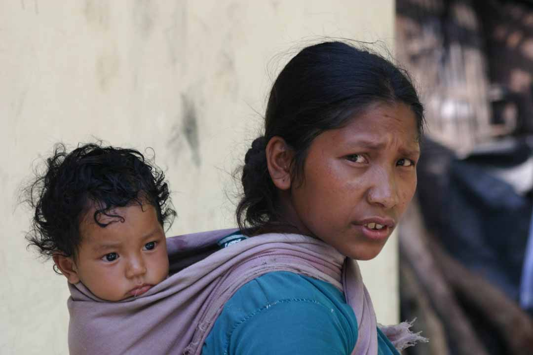 Mam a'i phlentyn, Gangtok.